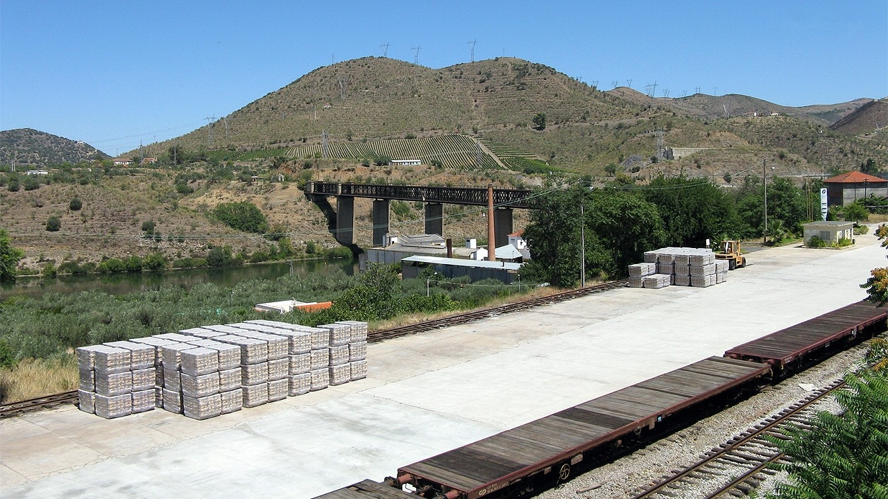 Ponte Rodo-Ferroviária do Pocinho, encerrada ao mesmo tempo que a Linha do Sabor e estando em risco de ruína eminente